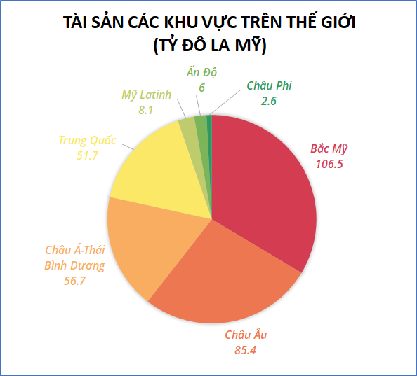 Biểu đồ tròn thể hiện tổng tài sản ròng của các châu lục/khu vực/quốc gia năm 2018 theo số liệu của Credit Suisse, tính theo đô la Mỹ.